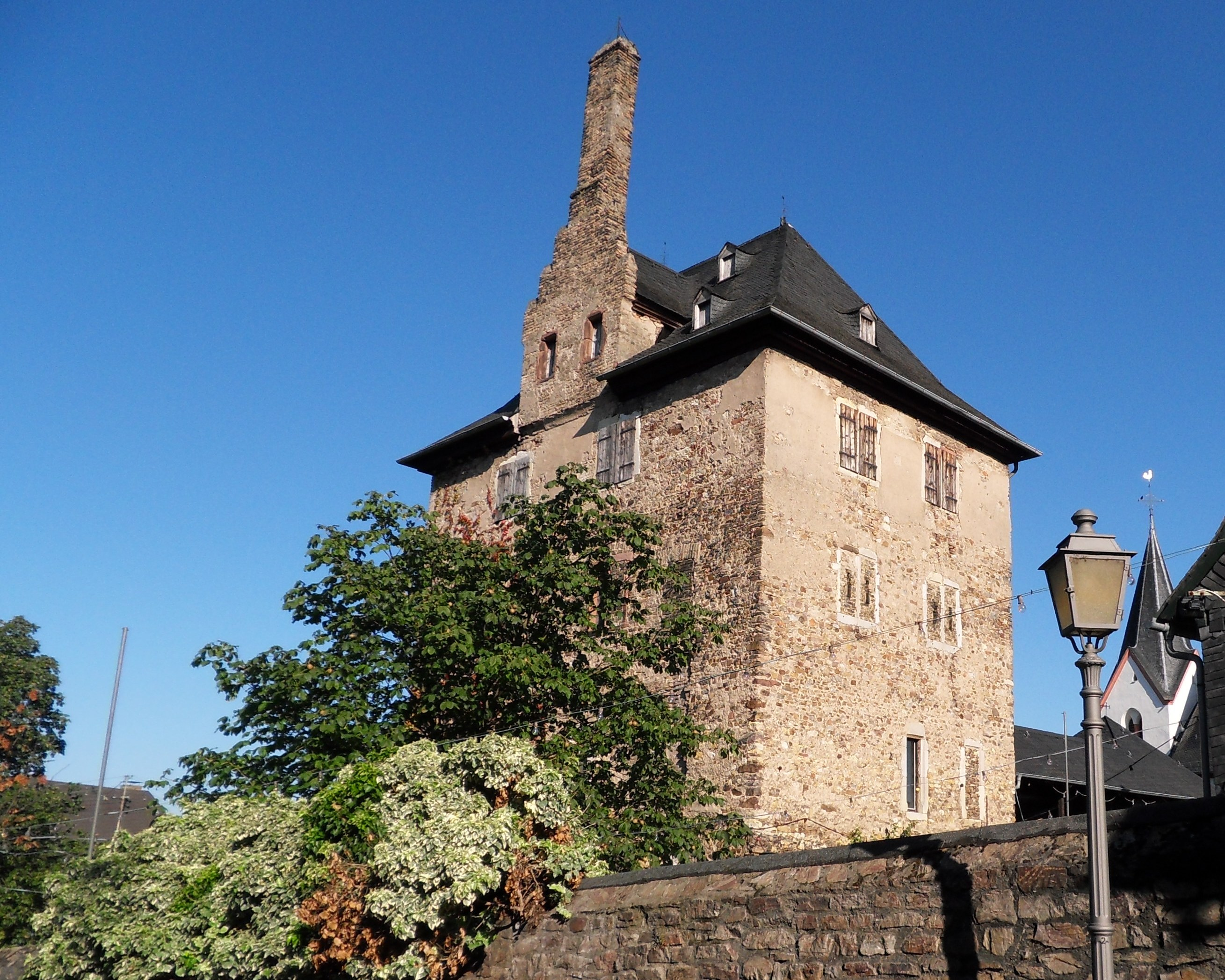 West- und Nordseite der Hattenheimer Burg mit Burgmauer